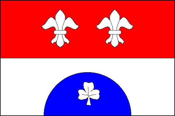 Vlajka obce Nová Ves u Chotěboře